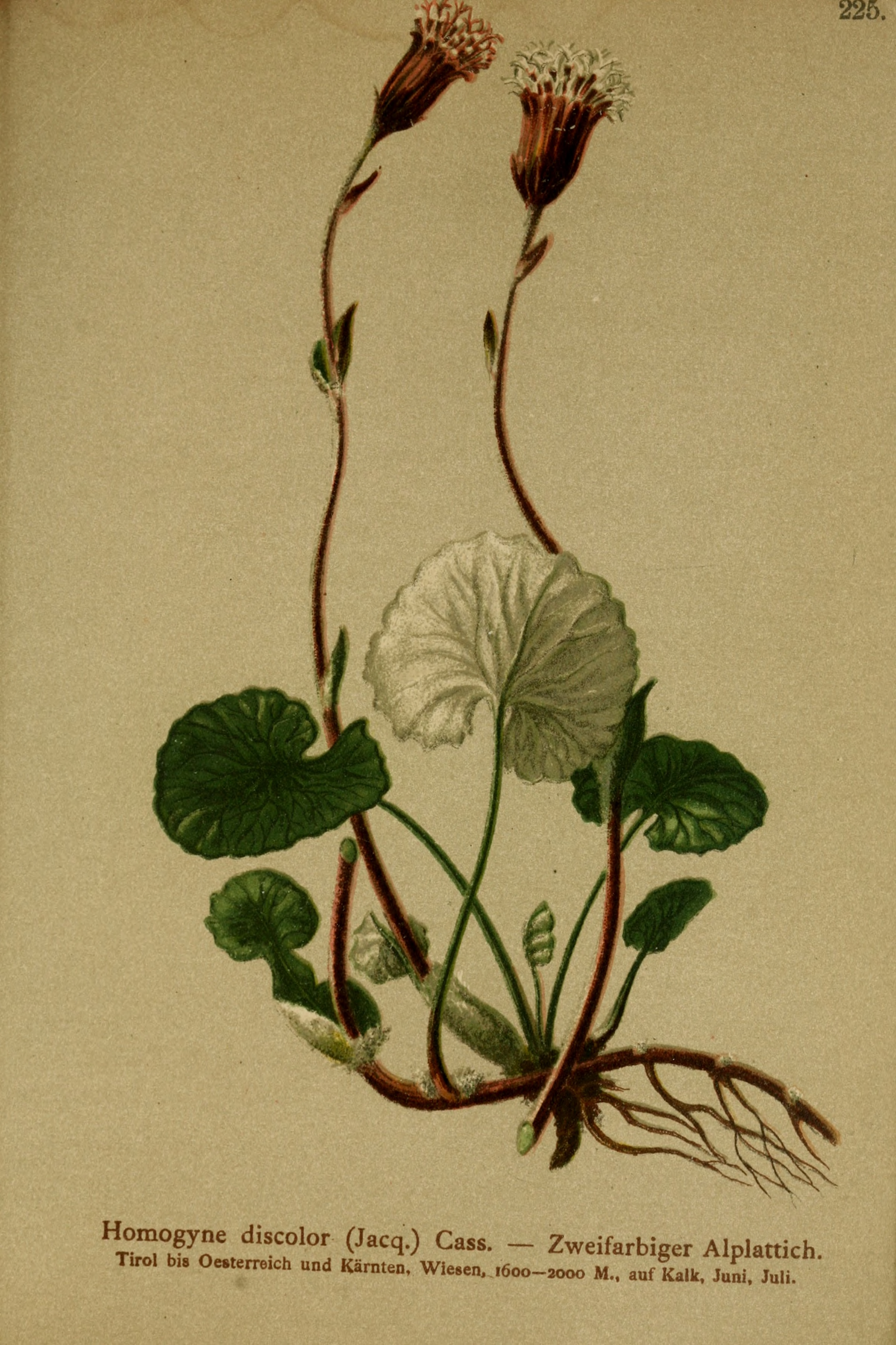 Legende: Ganze Pflanze.